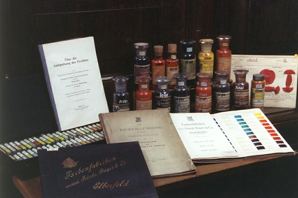 Historische Musterkarten und Farbstoffproben Friedrich Bayer & Co. (Historische Farbstoffsammlung der TU Dresden)